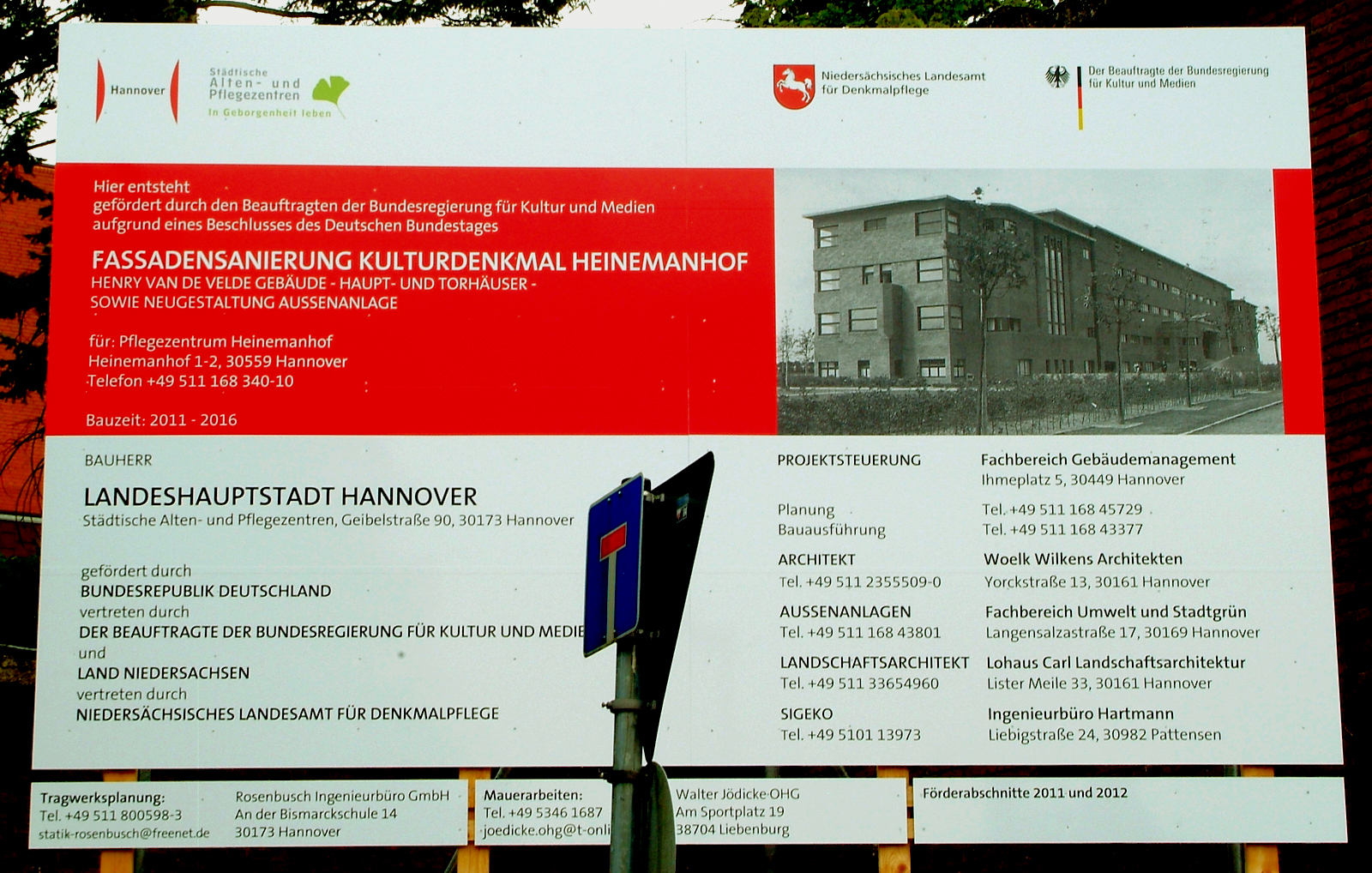 Erläuterungs-Tafel zur "Fassadensanierung Kulturdenkmal Heinemanhof"; Bauherr ist die niedersächsische Landeshauptstadt Hannover, Förderer ist aufgrund eines Beschlusses des Deutschen Bundestages, vertreten durch den Beauftragten der Bundesregierung für Kultur und Medien, sowie durch das Land Niedersachsen, vertreten durch das Niedersächsische Landesamt für Denkmalpflege ... Die Gesamt-Bauzeit inklusive der Neugestaltung der Aussenanlagen durch den hannoverschen Fachbereich Umwelt und Stadtgrün wird hier für den Zeitraum von 2011 bis 2016 angegeben ...